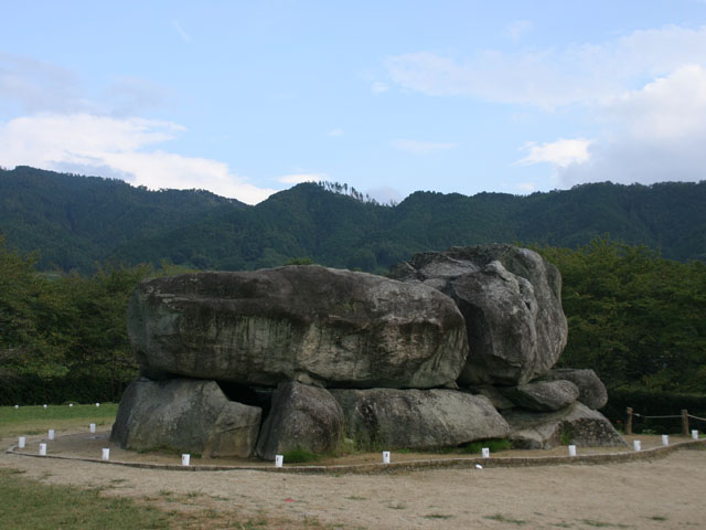 石舞台古墳